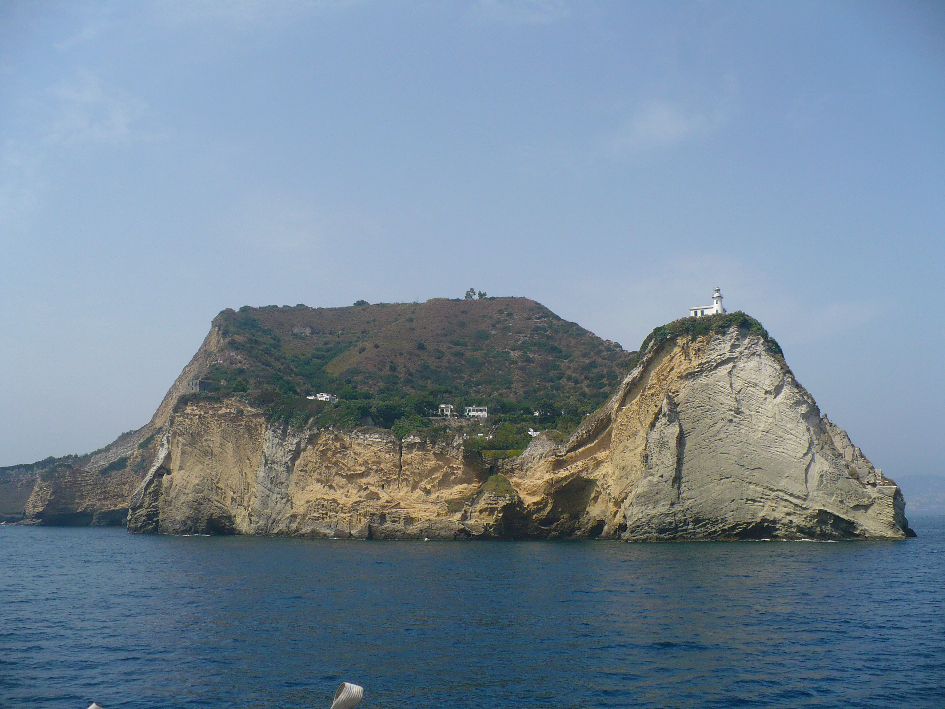 Comune di Bacoli - Campi Flegrei, Capo Miseno : veduta dal mare (da sud-ovest) del promontorio, antico resto di un vulcano datato fra i 35.000 e i 10.500 anni fa. Il vulcano, del tutto smantellato dal mare o collassato nelle sue profondità, mostra ancora una porzione della sua caldera, individuabile nella conca formata dalle sue pendici meridionali ed il rilievo su cui è posto il faro. Autore foto. Roberto De Martino